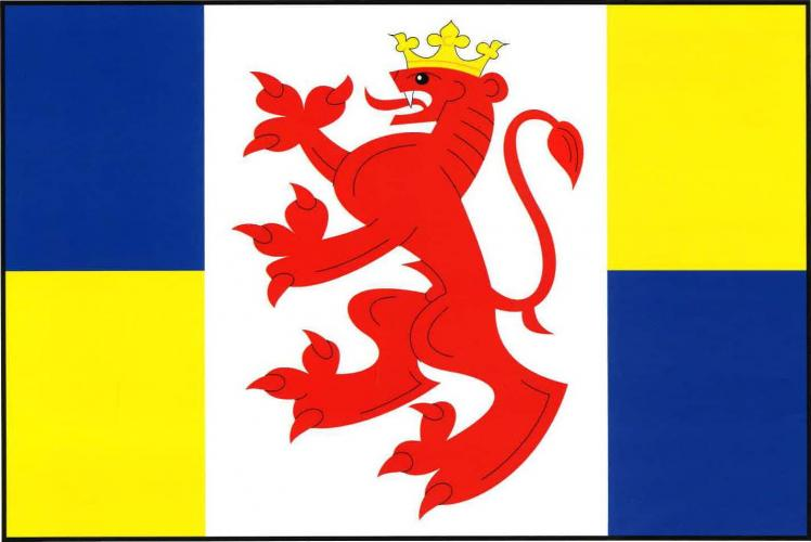 vlajka, Tupadly, okres Kutná Hora